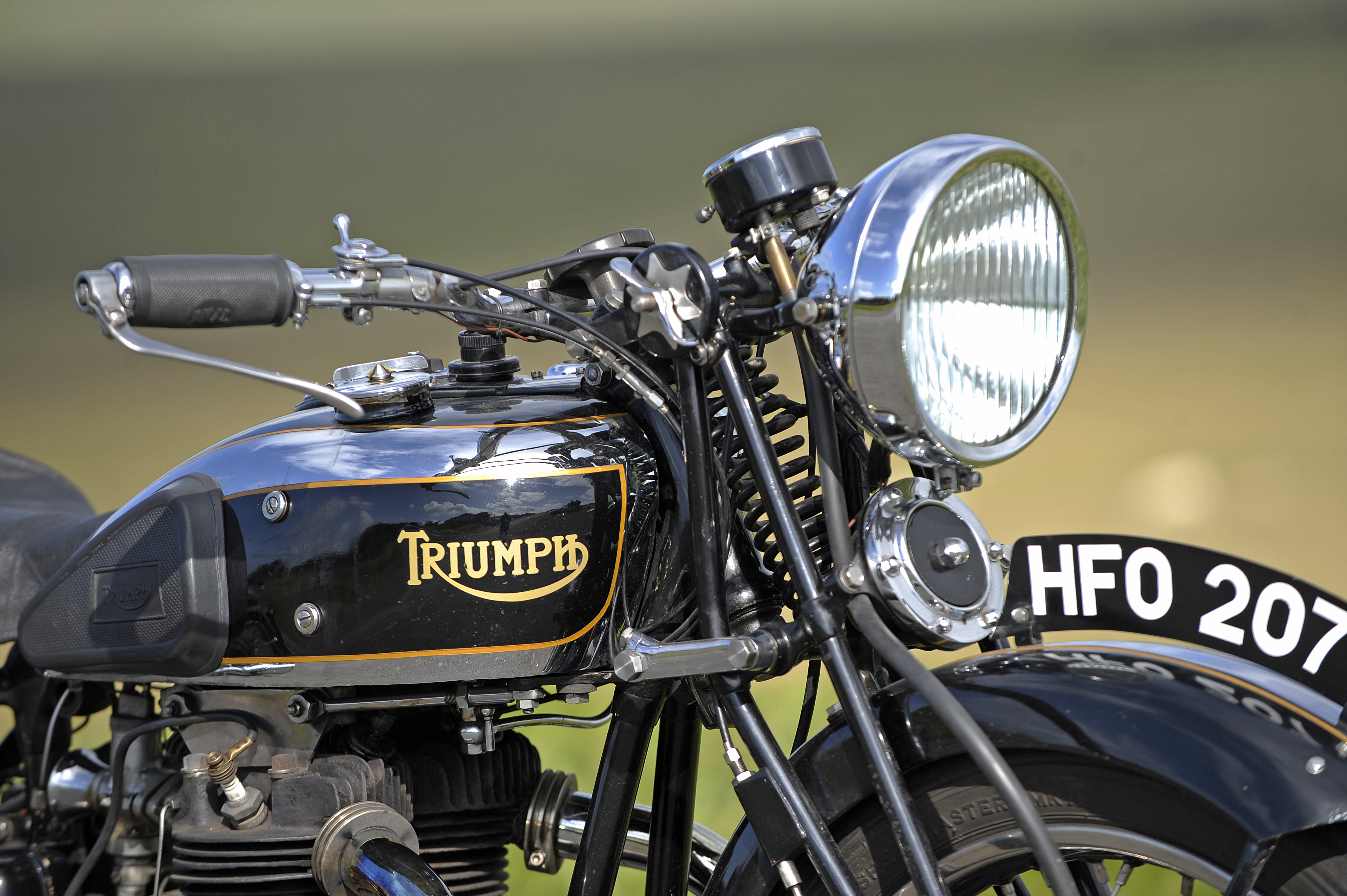 Triumph 6/1